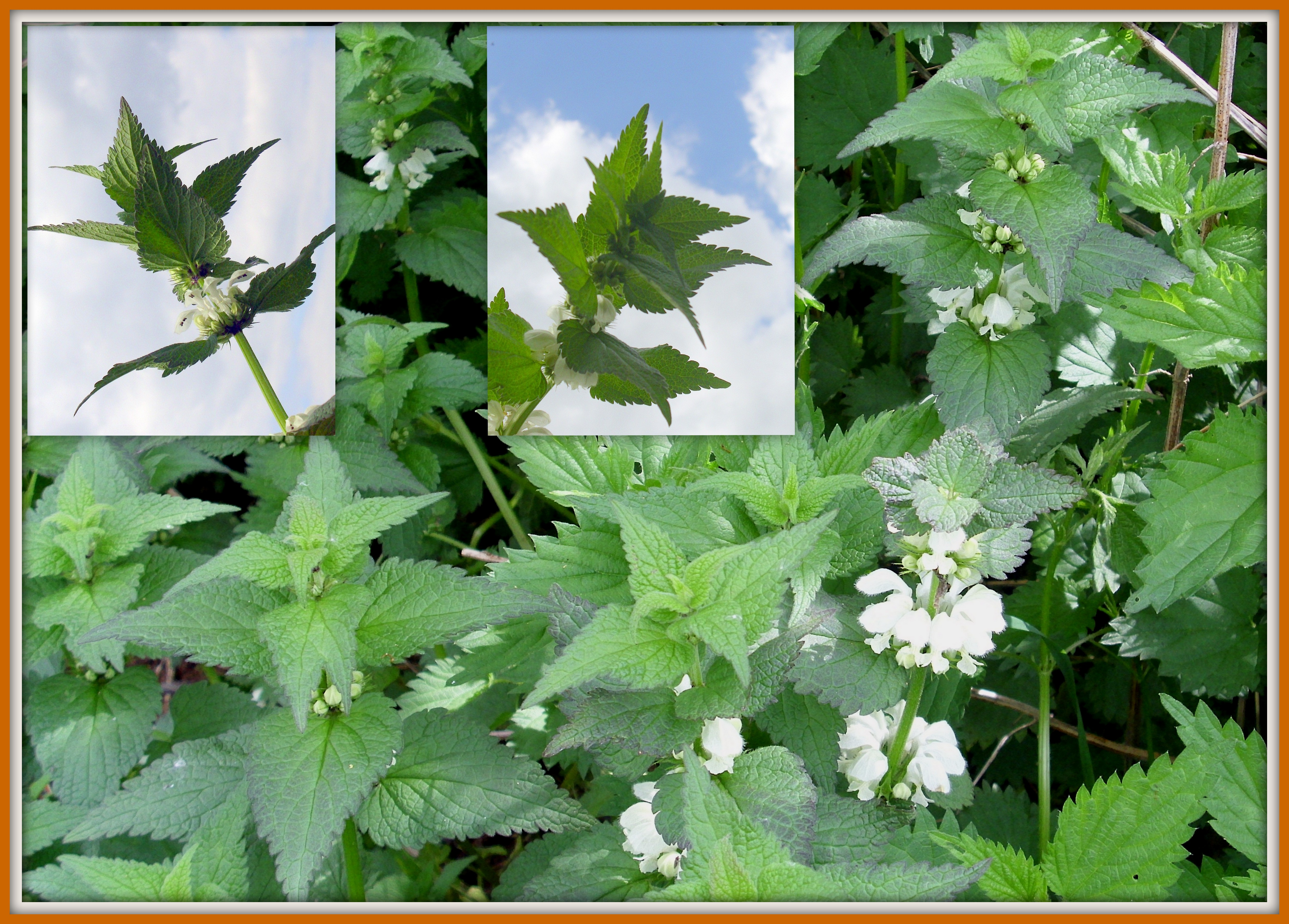 Weiße Taubnessel im Naturschutzgebiet Schwarzbachtal bei Obercarsdorf